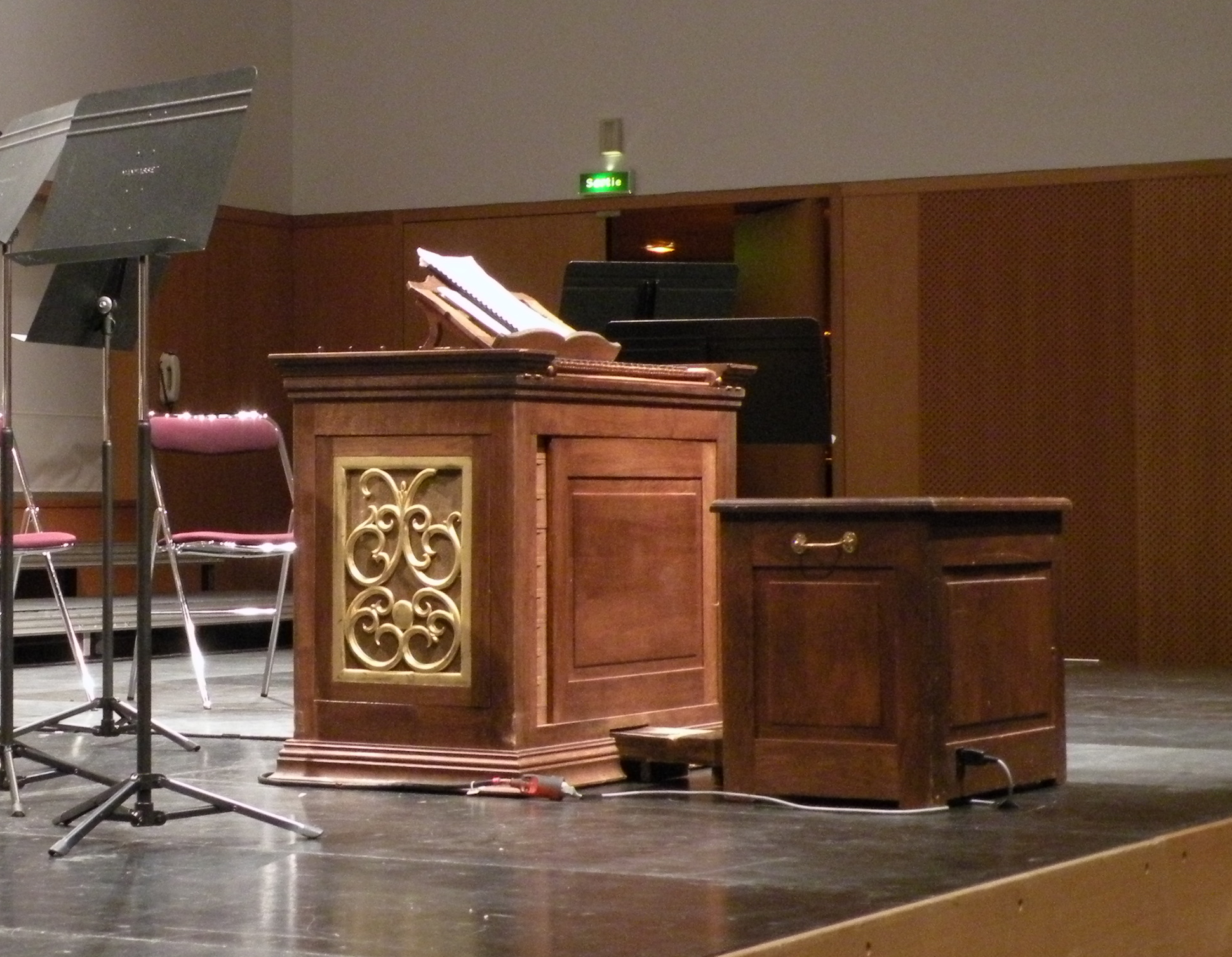 La Folle Journée de Nantes, 29 janvier 2009, salle Lunenbourg : l'orgue positif de l'Amsterdam Baroque Orchestra.